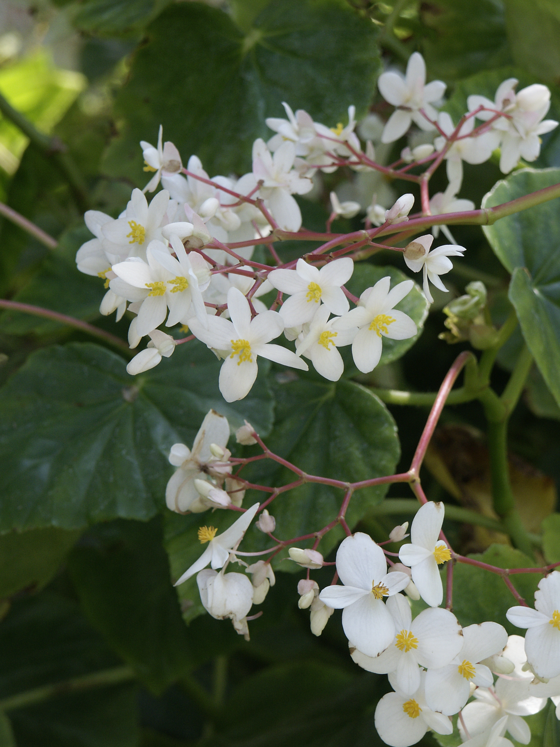 Begonia minor (Begonia odorata 'Alba') Fairchild Tropical Botanic Garden, Miami, Florida, USA.